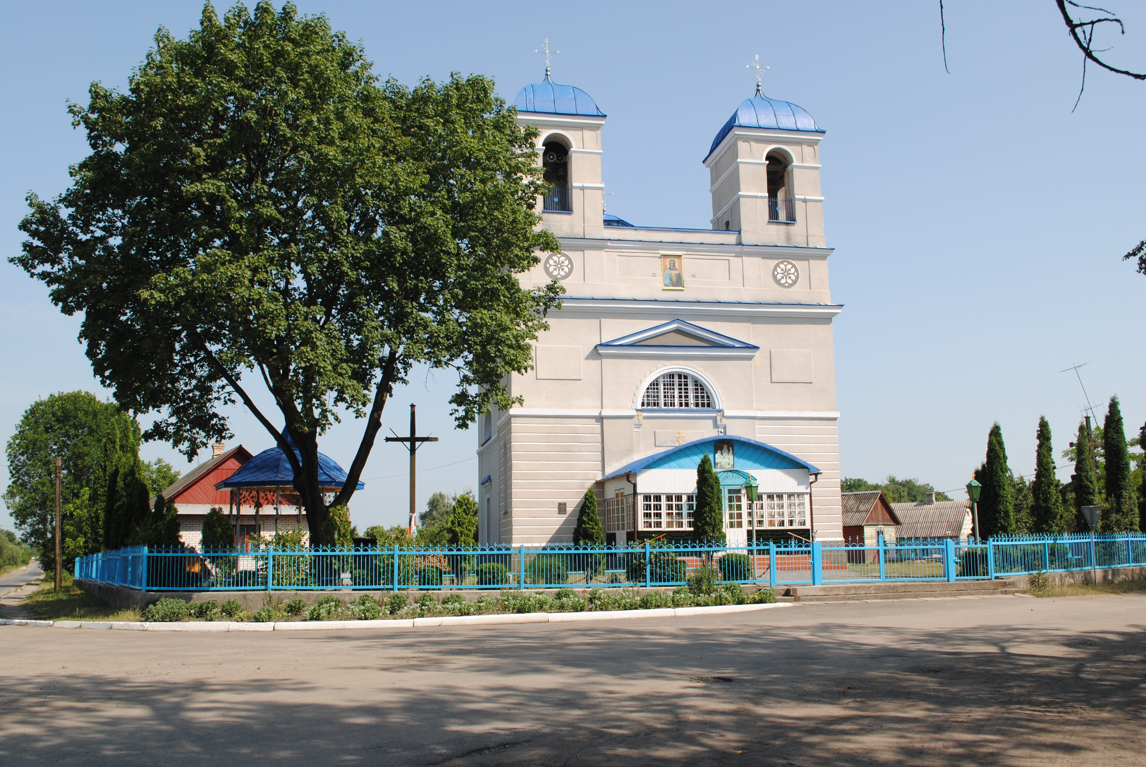 Cerkiew Narodzenia Najświętszej Bogarodzicy, murowana, z lat 1830-1839 w Szacku